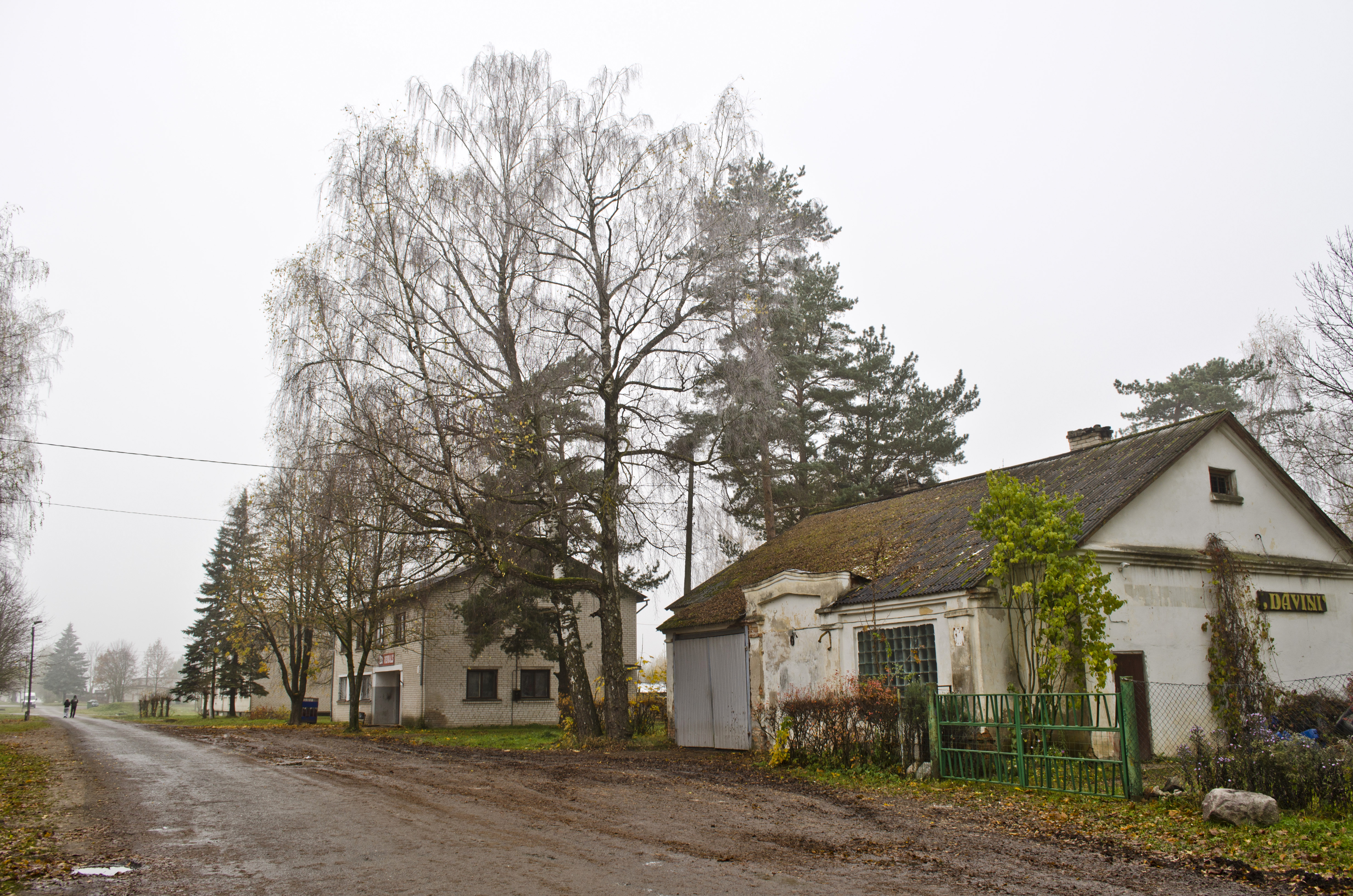 Dāviņi, Latvia.